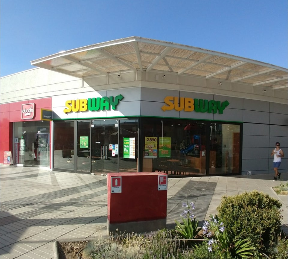 subway en la florida